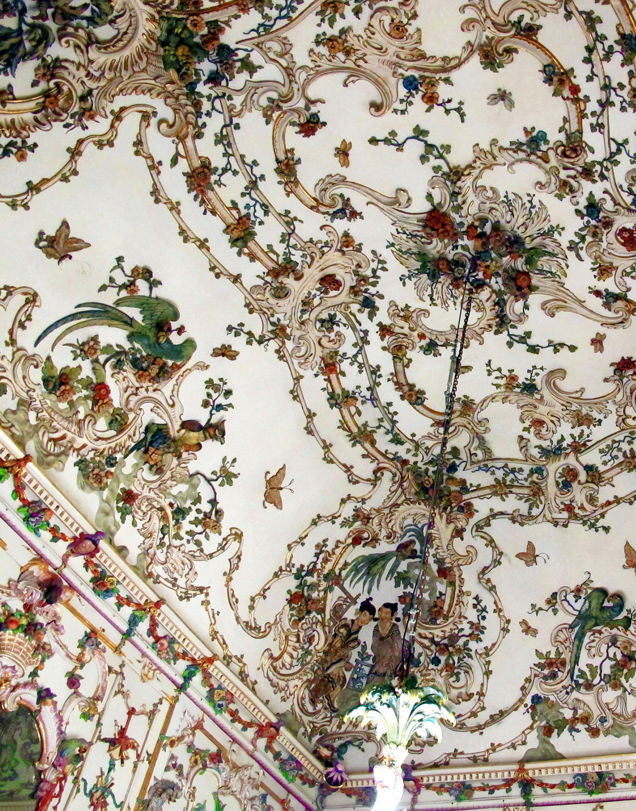 Appartamento Reale (Museo di Capodimonte)